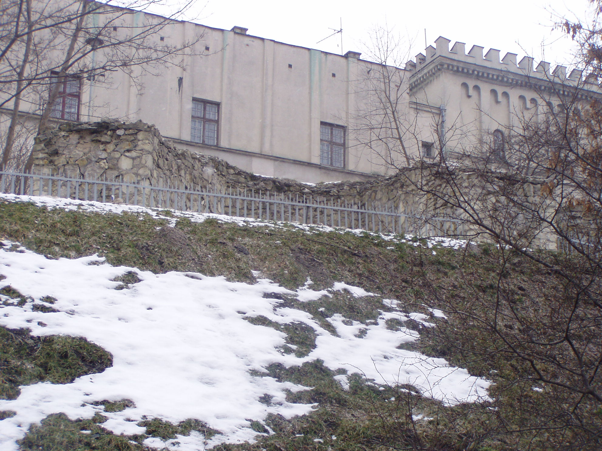 Pozostalości baszty zamowej zwanej żydowską (Lublin) Autor: Slav